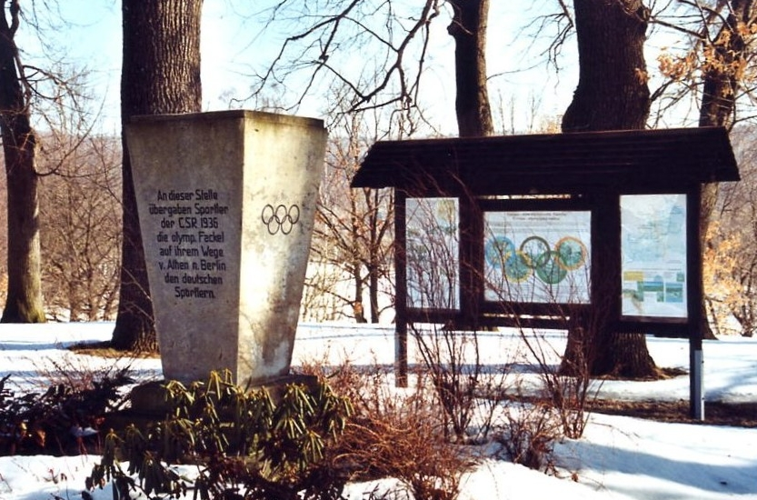 Bahratal, OT Hellendorf: Olympia-Gedenkstein am ehemaligen Grenzübergang Bahratal-Peterswald (Petrovice). An dieser Stelle übergaben 1936 tschechoslowakische Sportler das olympische Feuer auf seinem Weg von Athen nach Berlin an deutsche Sportler. Der Gedenkstein wurde 20 Jahre später anlässlich der Olympischen Spiele in Melbourne 1956 eingeweiht.